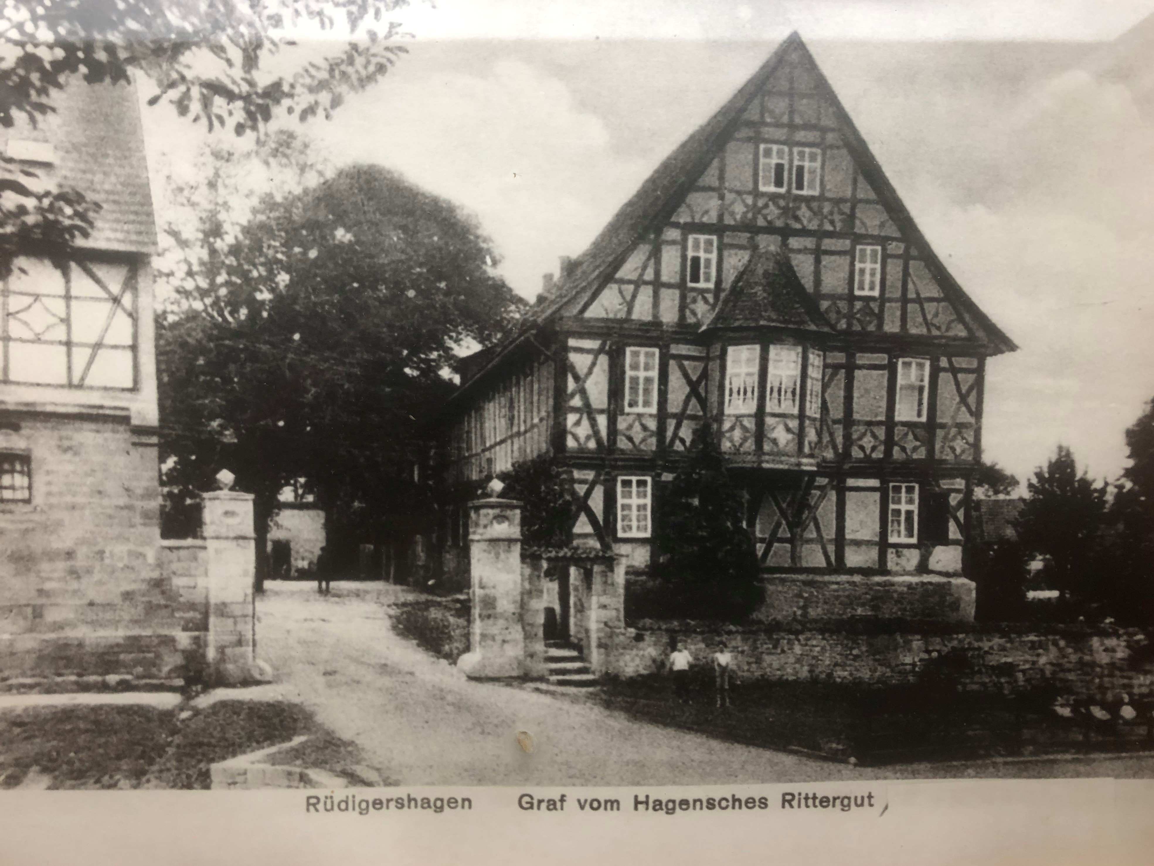 Foto Familienarchiv Grafen vom Hagen